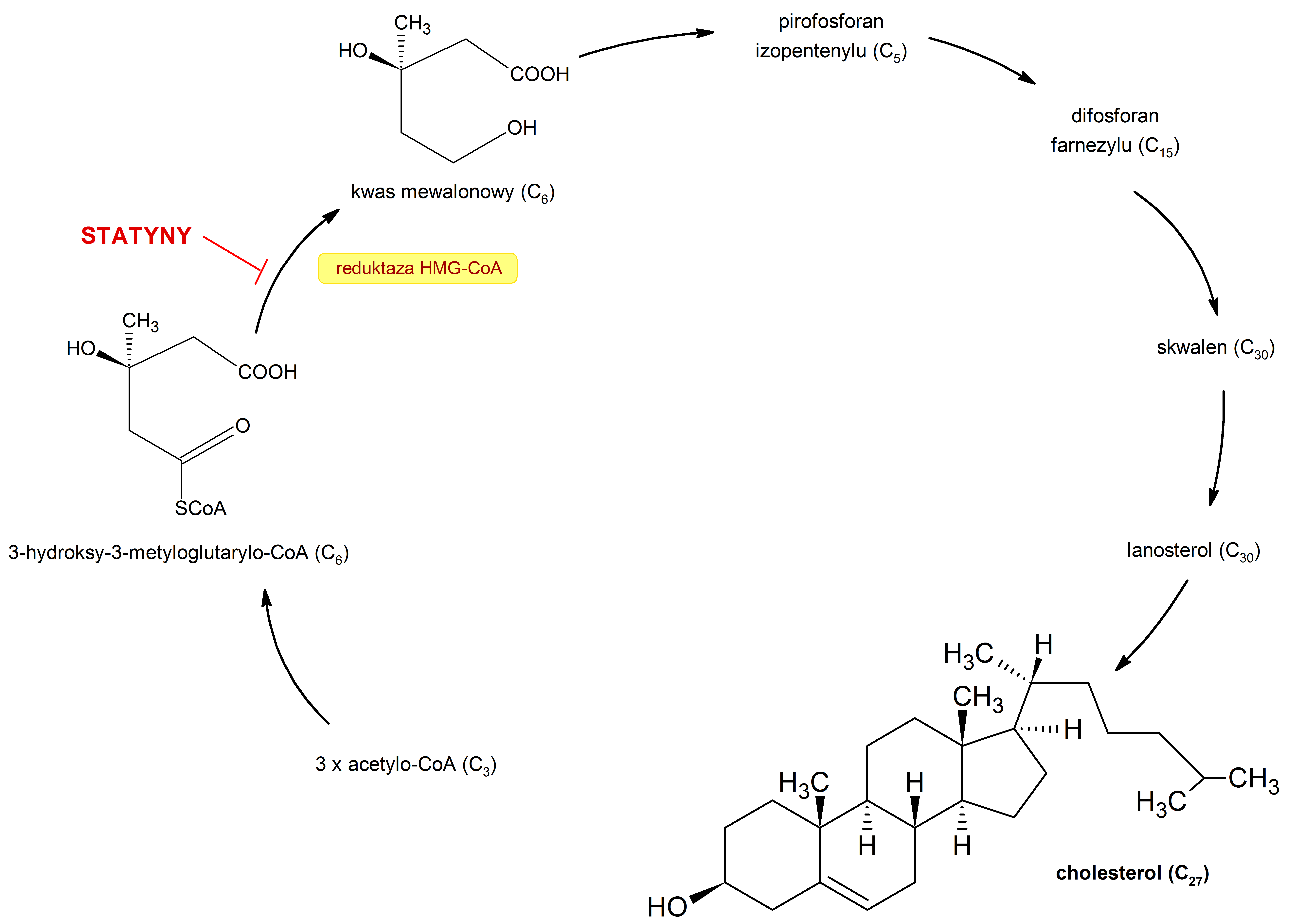 Biosynteza cholesterolu (za Steinhilber, Schubert-Zsilavecz, Roth Chemia medyczna strona 436)